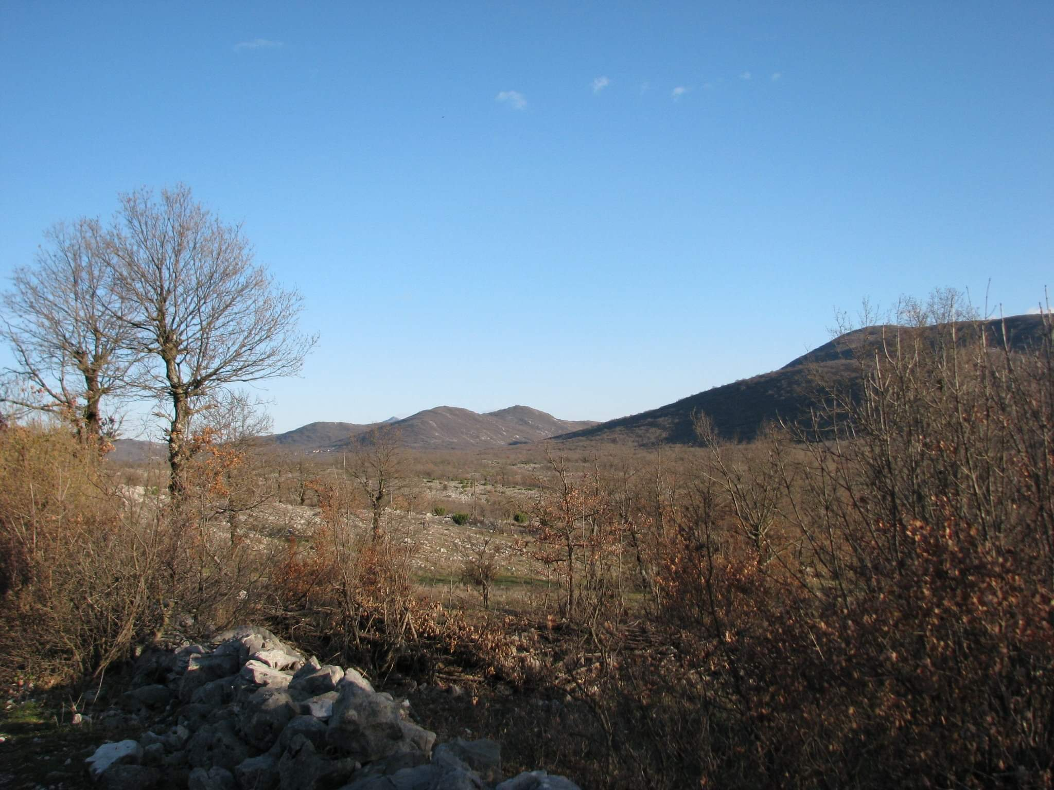 Srpski (latinica): Selo Bančići (Ljubinje).